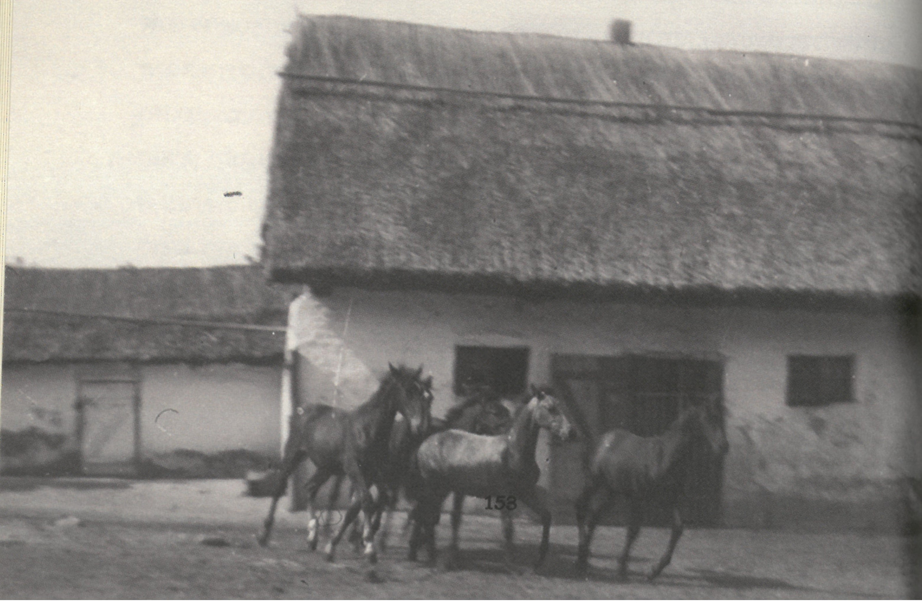 סוסים דוהרים באחת מחוות קהילת אקל